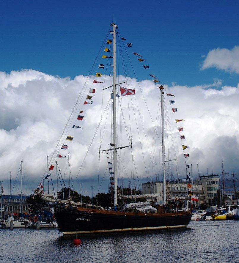 SY Zjawa IV - Powitanie Zjawy IV 15 września 2012 w Gdyni